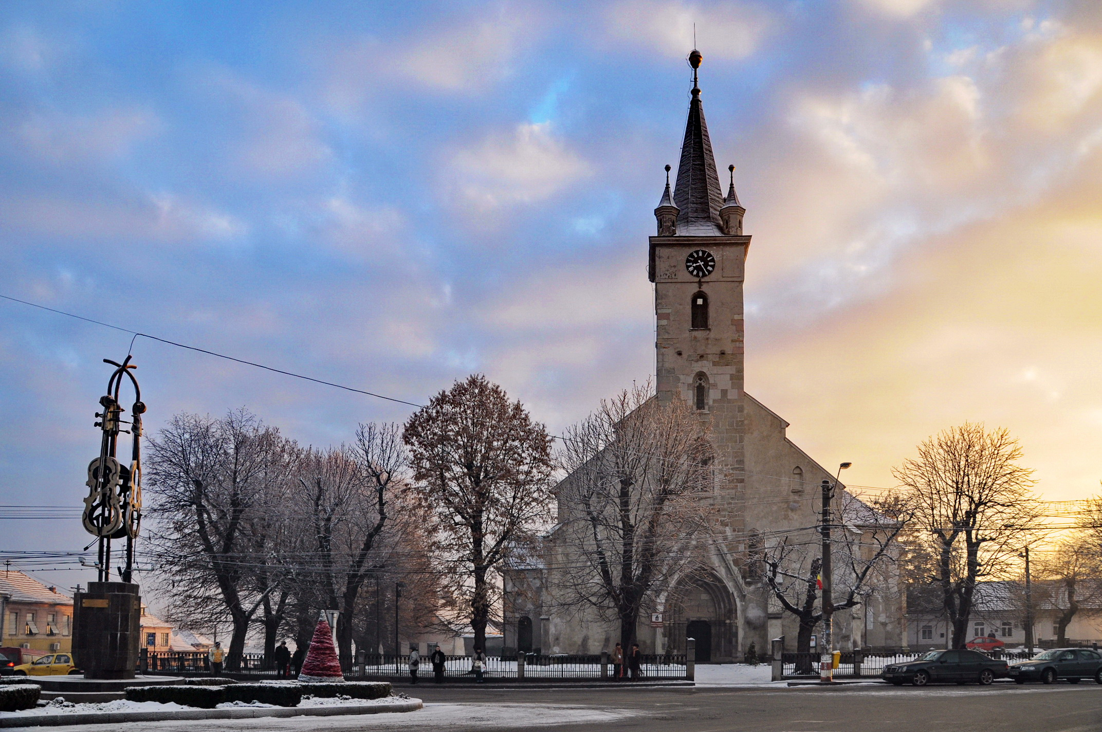 Biserica evanghelică 01